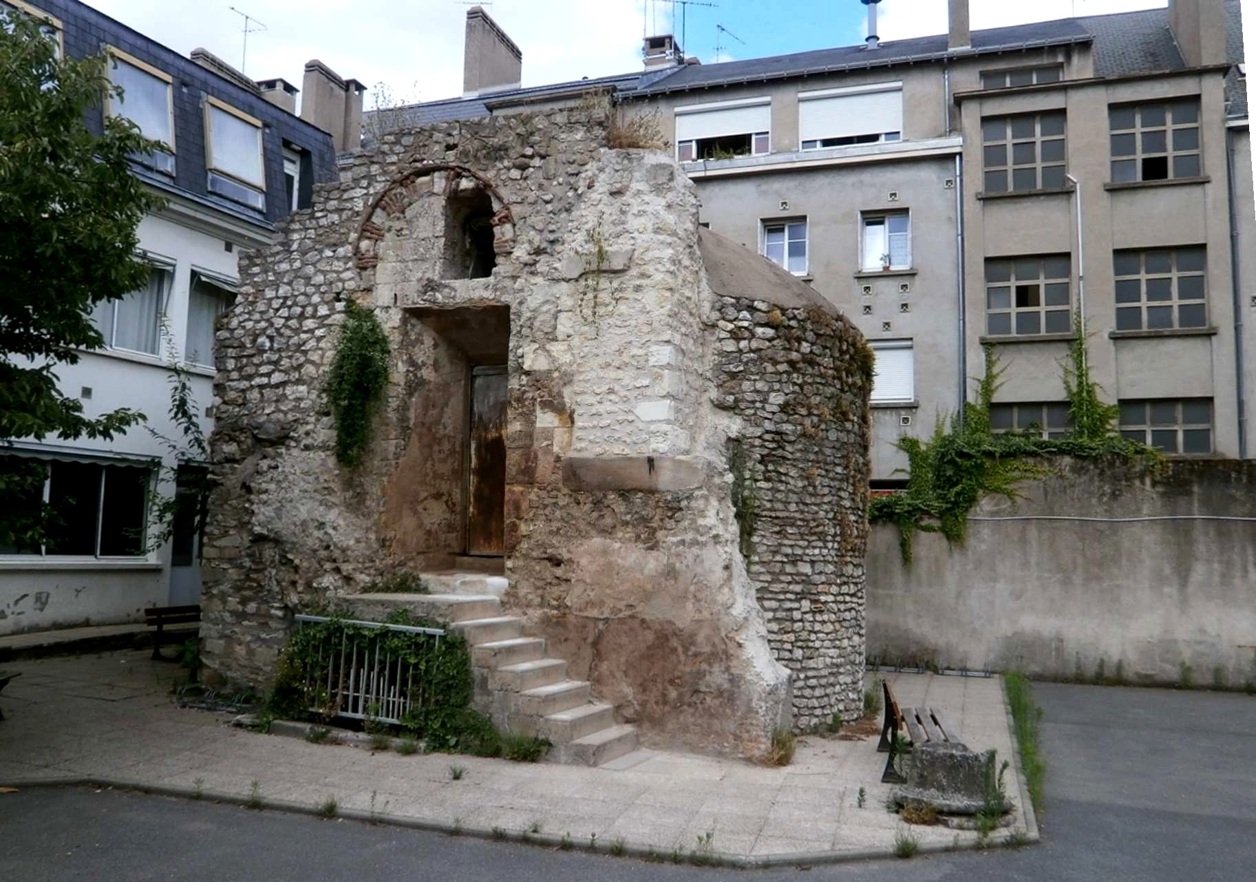 vestige de l'enceinte de la Martinopole de Tours